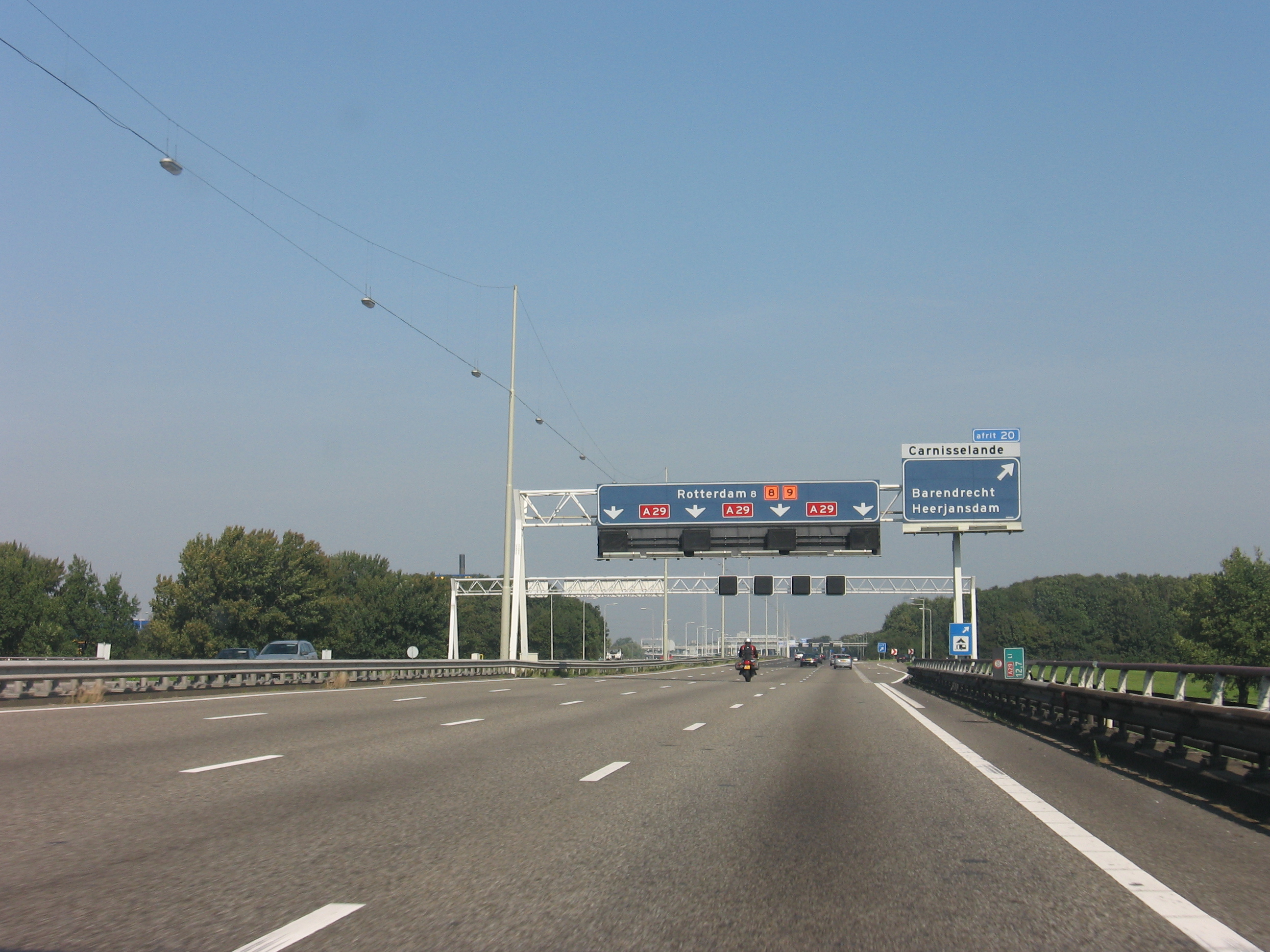 A29